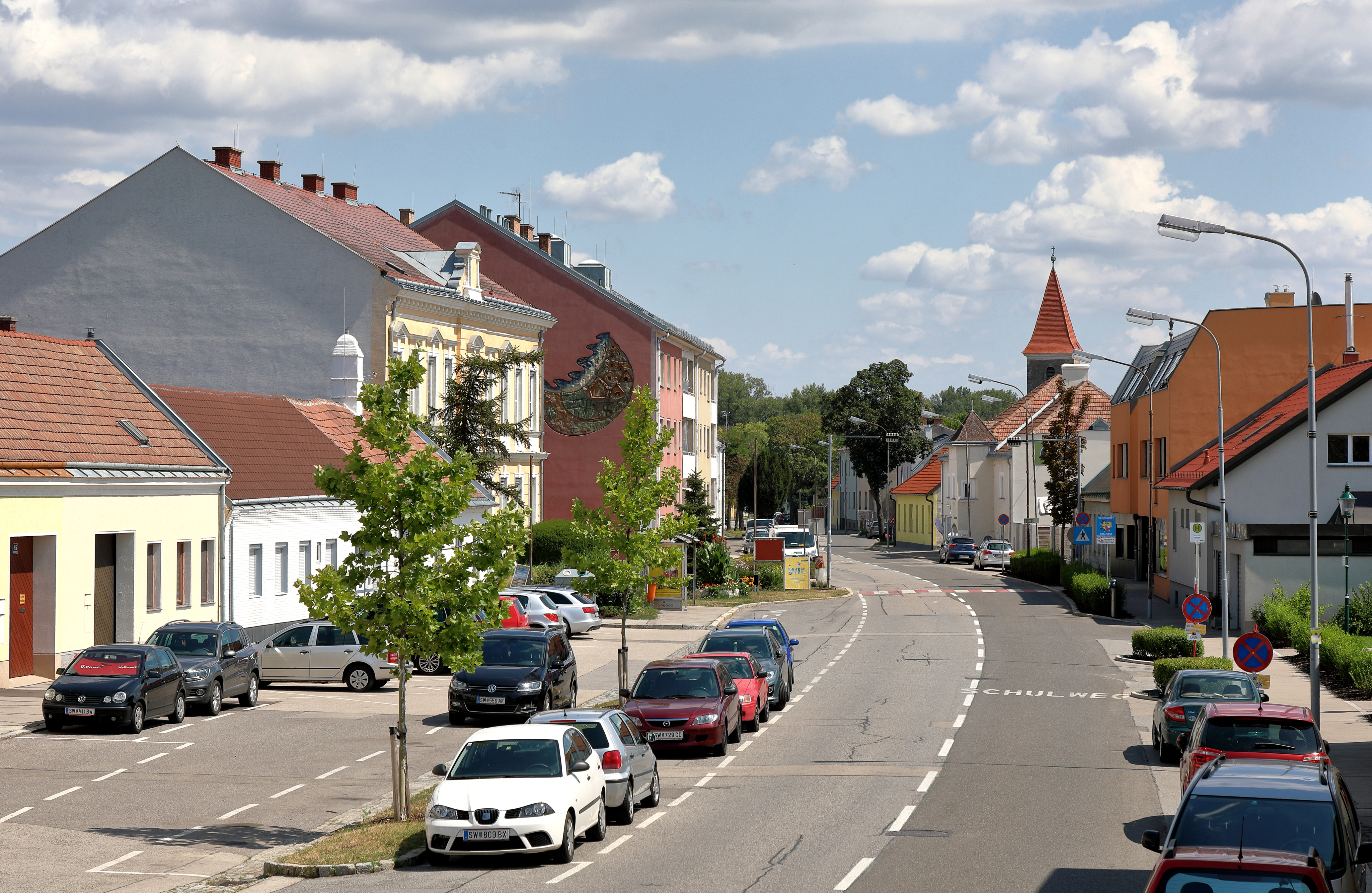 Ortszentrum von Mannswörth (Höhe Mannswörther Straße Nr. 93), eine ehemalige eigenständige Gemeinde und jetzt ein Ortsteil der niederösterreichischen Stadtgemeinde Schwechat.